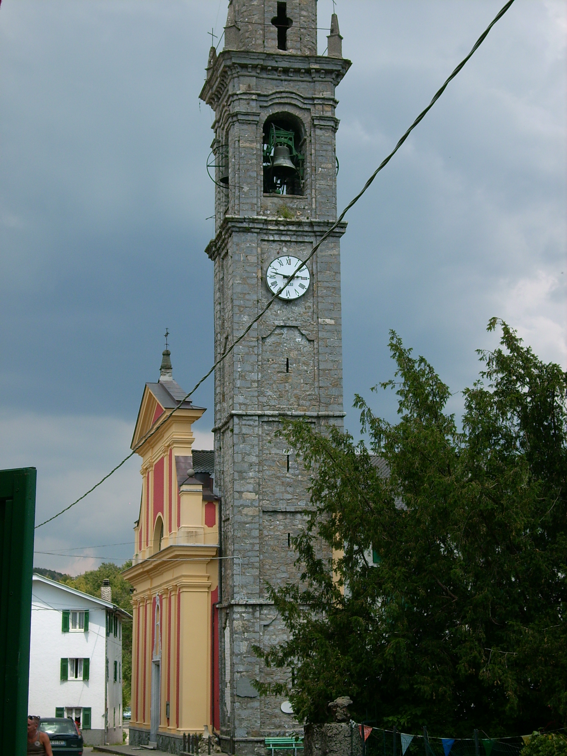 Chiesa di Cabanne, Rezzoaglio, Liguria, Italia